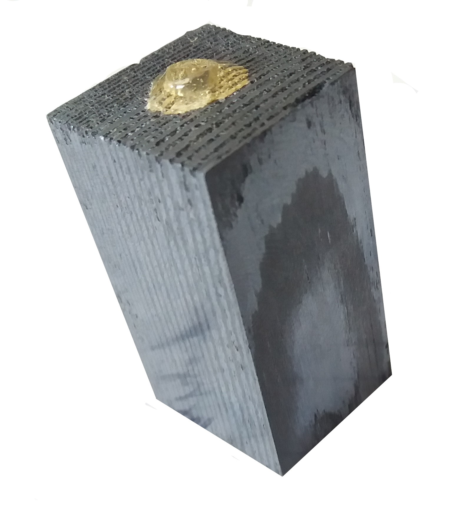 Keramik auf Basis von Vollholz mittels Flüssiginfiltration